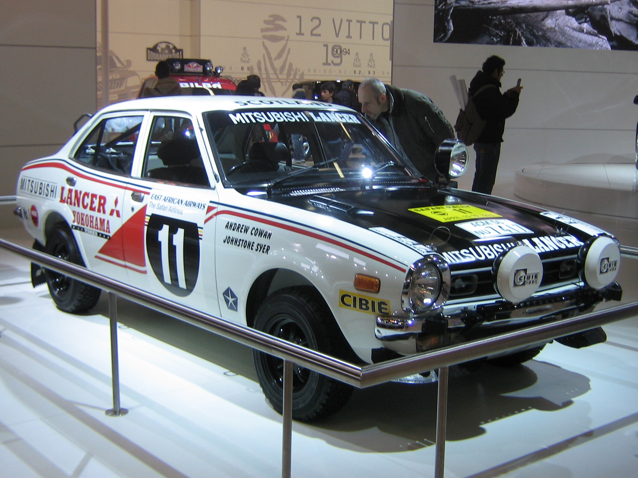 Mitsubishi Lancer 1600 GSR Safari Rally del 1976, fotografata al Motor Show di Bologna del 2007.